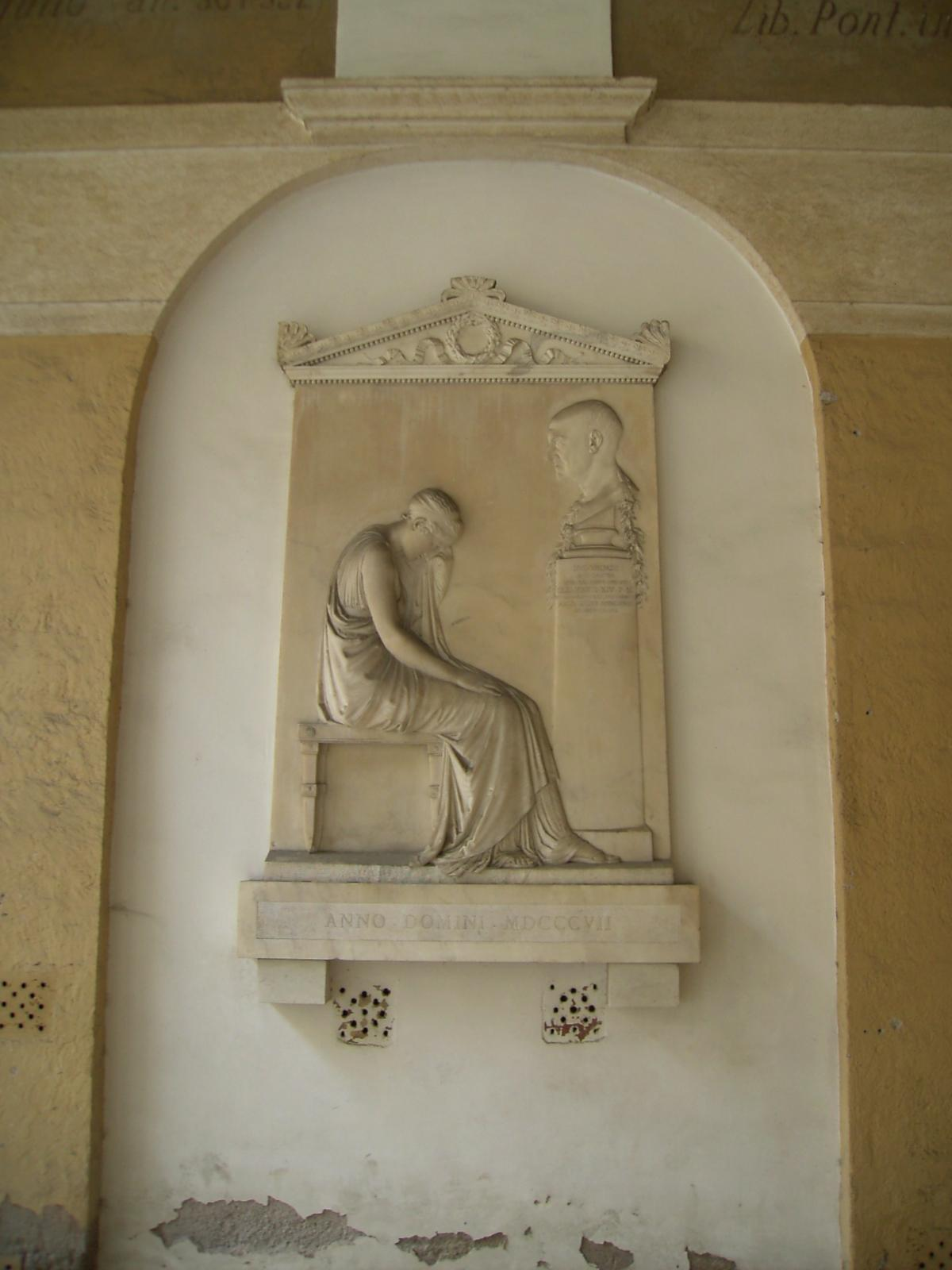 Antonio Canova (1757–1822) Description Italian sculptor Date of birth/death1 November 175713 October 1822Location of birth/deathPossagno (near Bassano)VeniceWork locationRomaAuthority control VIAF: 36965536 LCCN: n79008257 GND: 118518860 BnF: cb122039438 ULAN: 500115339 ISNI: 0000 0001 2100 6717 WorldCat WP-Person stele funebre Giovanni Volpato (Roma, Basilica dei Santi Apostoli, nel portico)